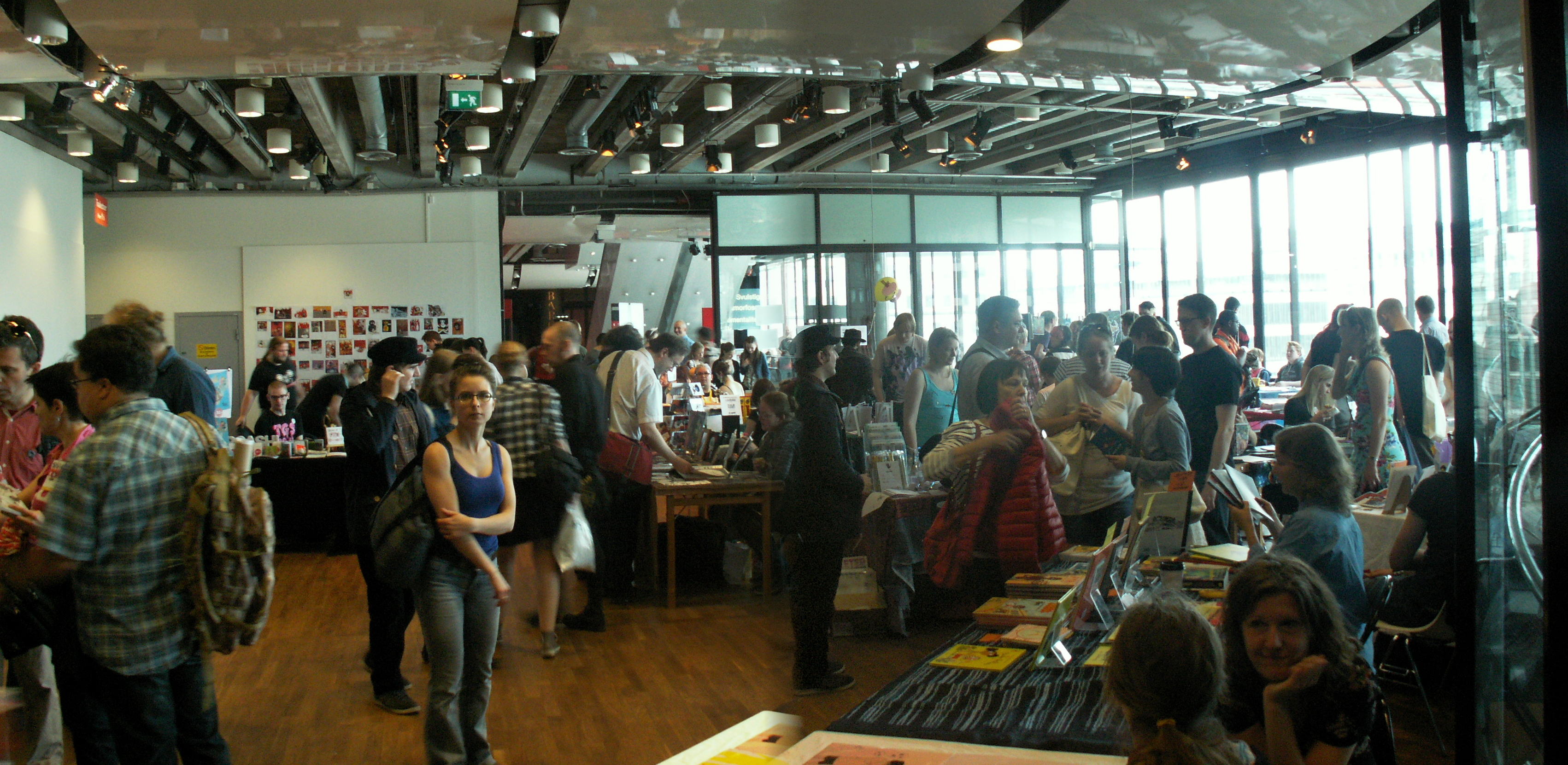 Panormama över Foajé 3 på Kulturhuset, i samband med Stockholms internationella seriefestival 2014.